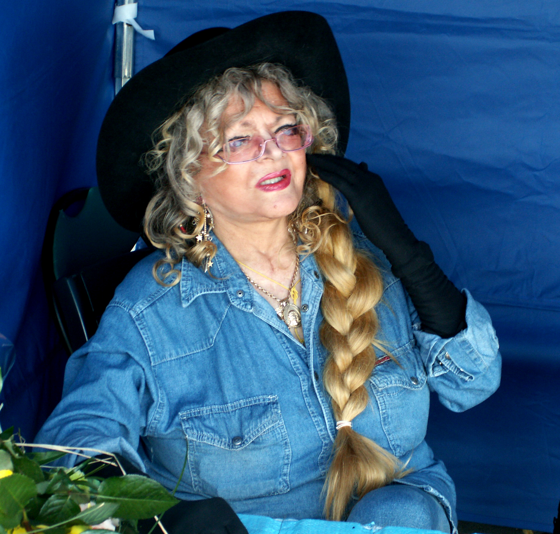 Violetta Villas na Jasnej Górze w Częstochowie 19 sierpnia 2009 r.